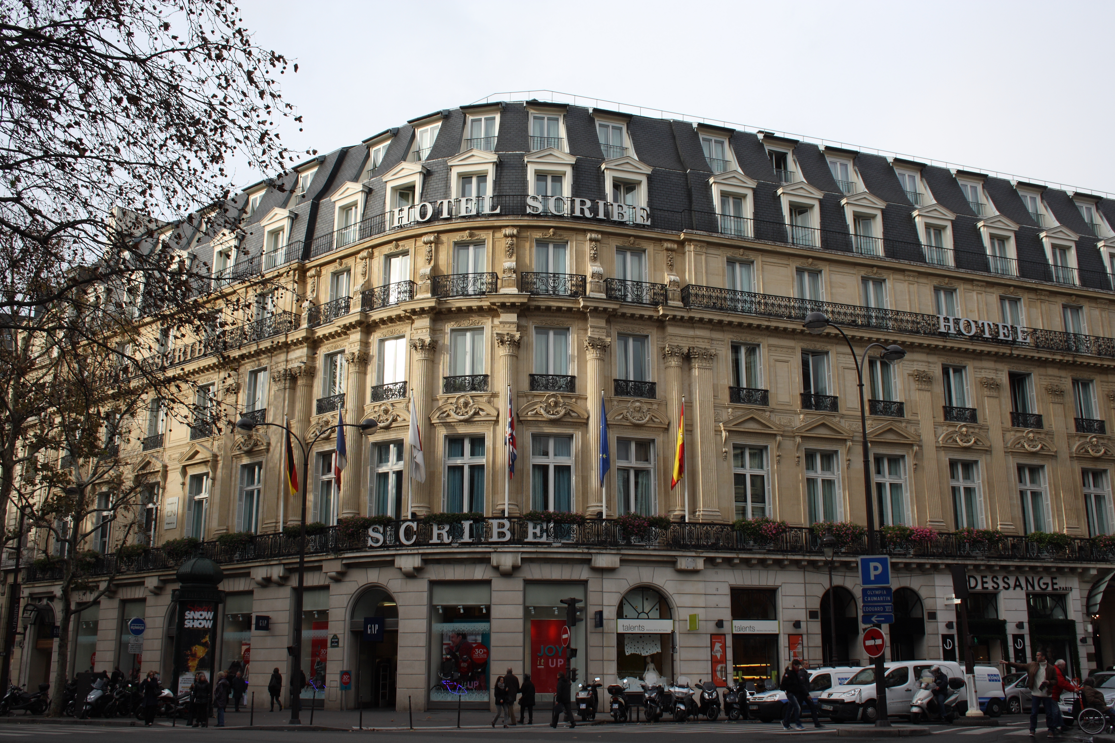 Hotel Scribe: Ecke Boulevard des Capucines/Rue Scribe in Paris (9. Arrondissement)